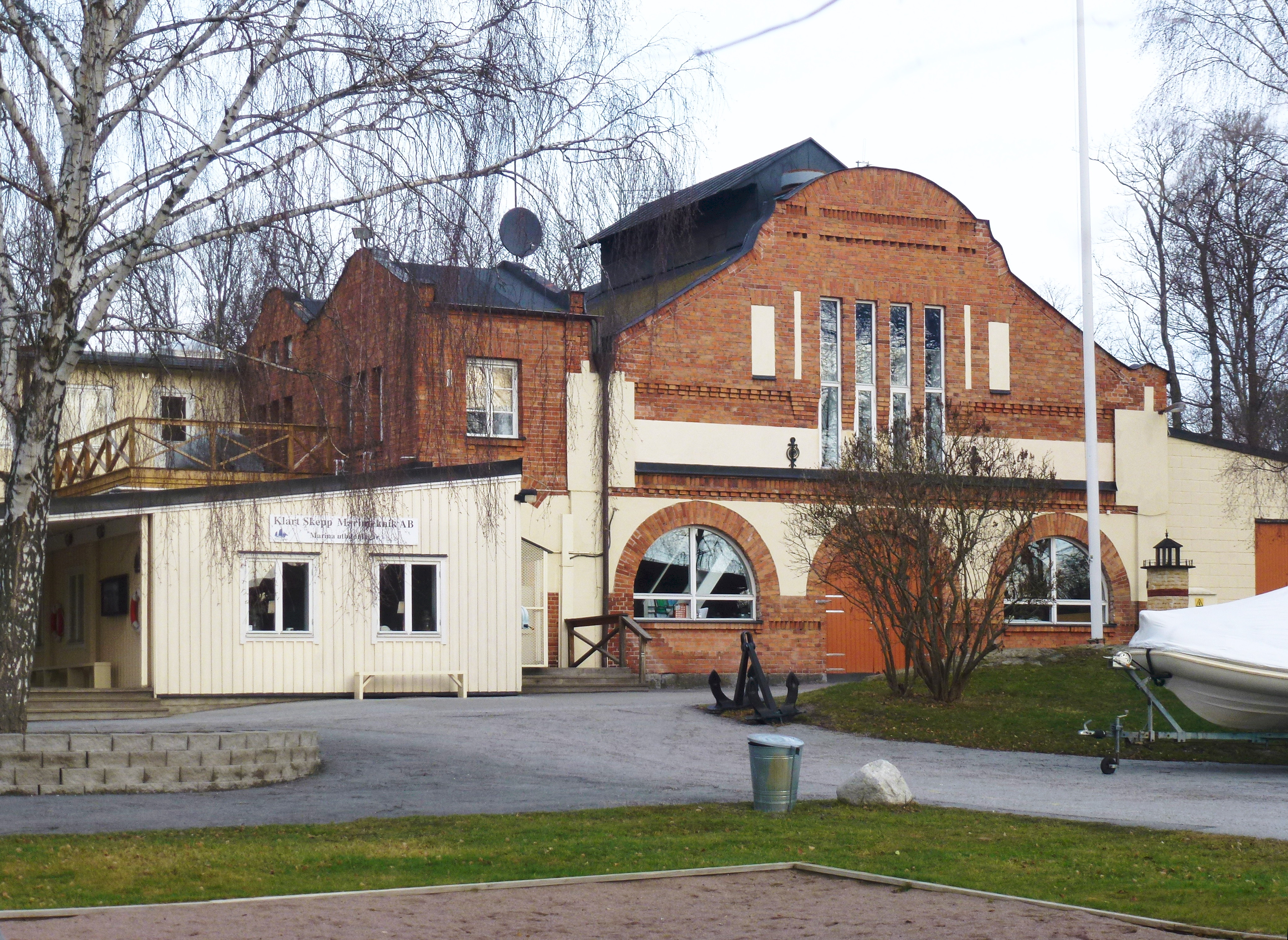 Djursholmsbanans elverk i Stocksunds hamn, byggt 1893 efter ritningar av SiggeCronstedt, idag Marina läroverket